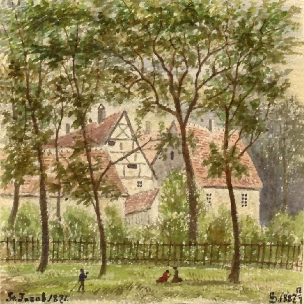 Das Jakobshospital in Leipzig vom Rosental aus gesehen